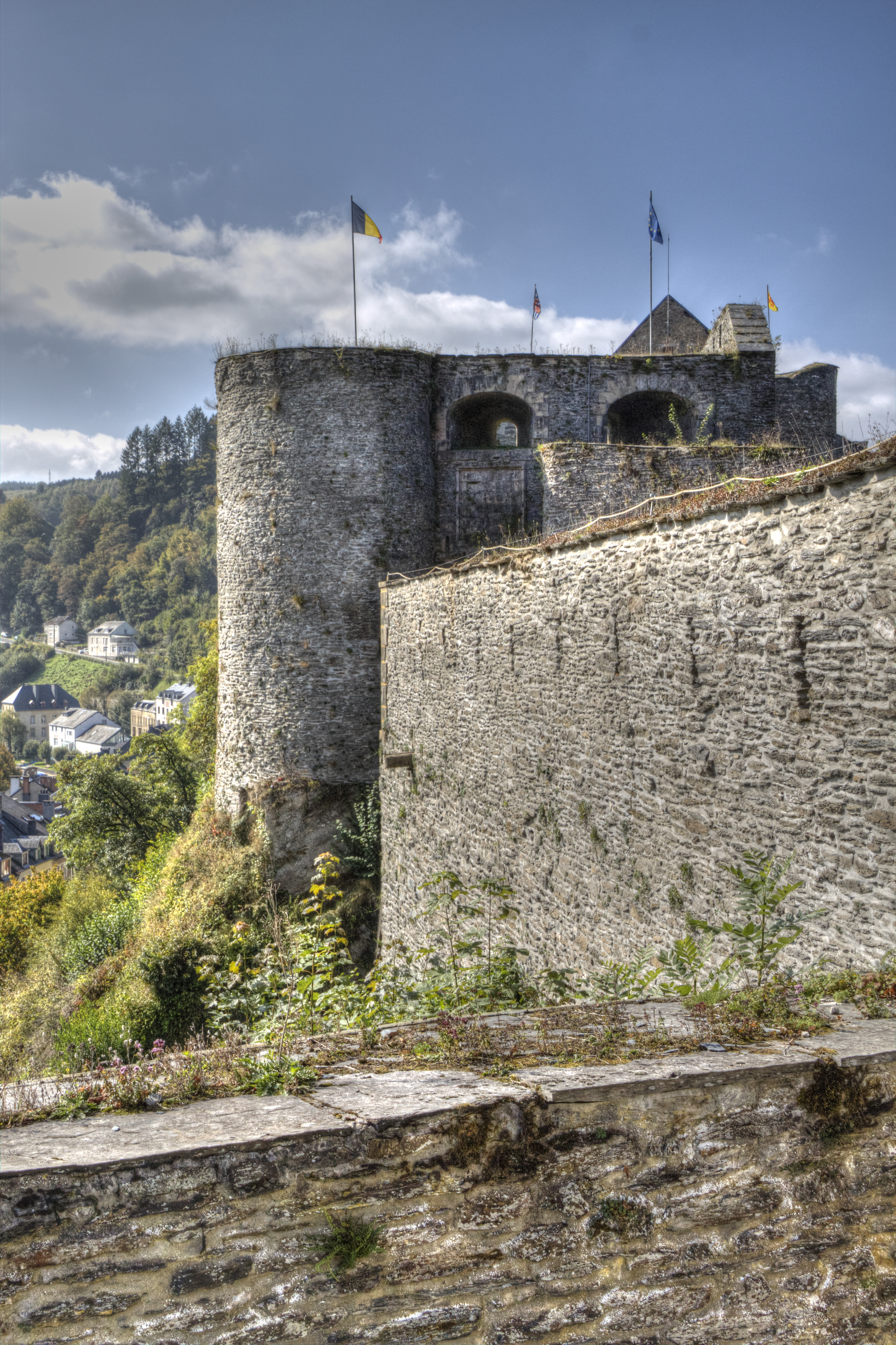 Versterkte wallen, grenzend aan de esplanade van het kasteel van Bouillon. Dit deel van het kasteel werd als laatste toegevoegd in de XVIIe, XVIIIe en XIXe eeuw. Deels door de Nederlanders, deels door de Fransen.